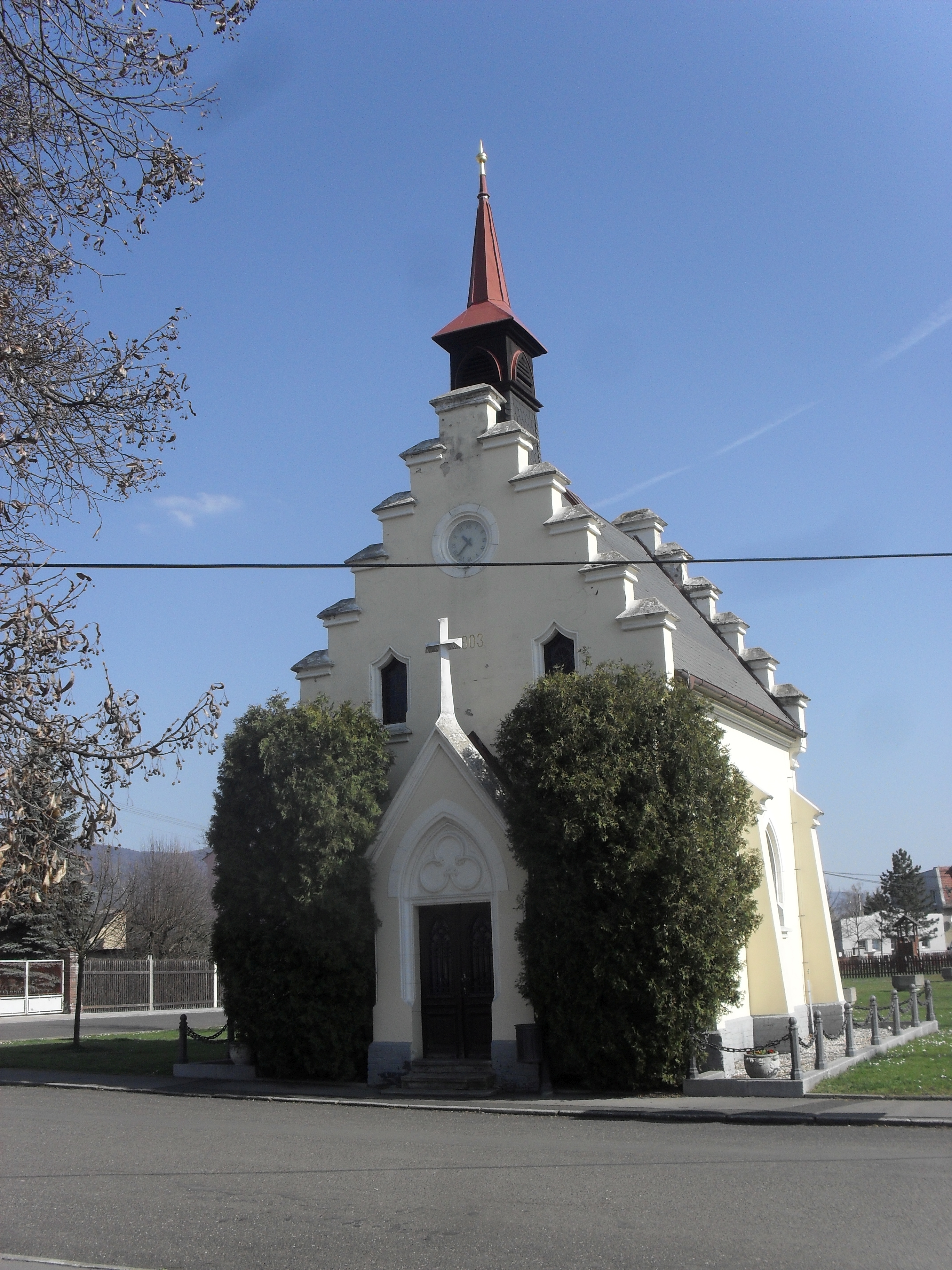 Fotografie pořízená ve Starých Srbicích.